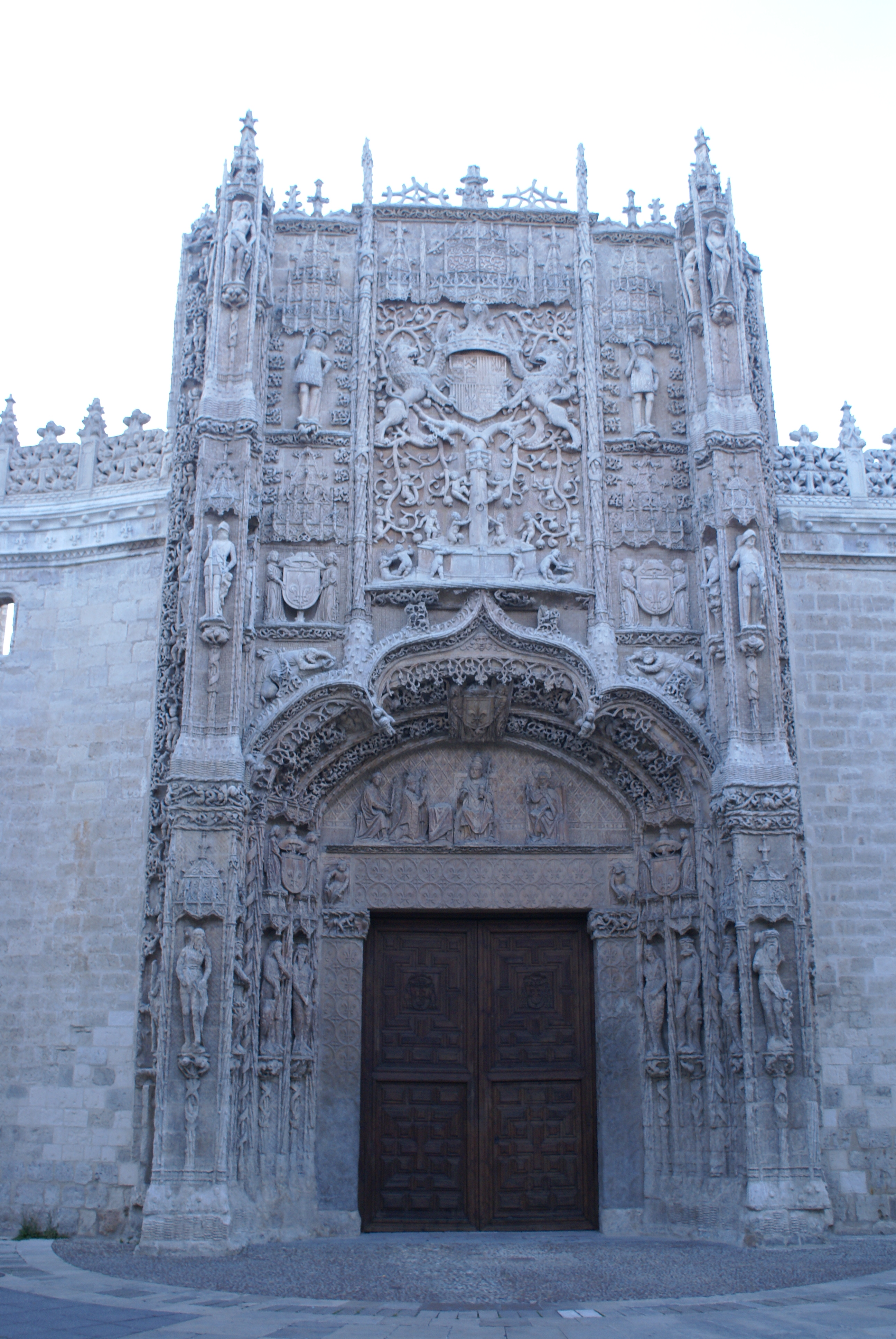 Valladolid - España (Spain) - Colegio de San Gregorio - Museo Nacional de Escultura: Comenzaron las obras de su construcción en 1487 y finalizaron en 1496. Desde 1933 es la sede del Museo Nacional de Escultura Policromada, en el que podemos encontrar obras de los grandes imagineros como Gregorio Fernández, Juan de Juni o Alonso Berrugete, entre otros.